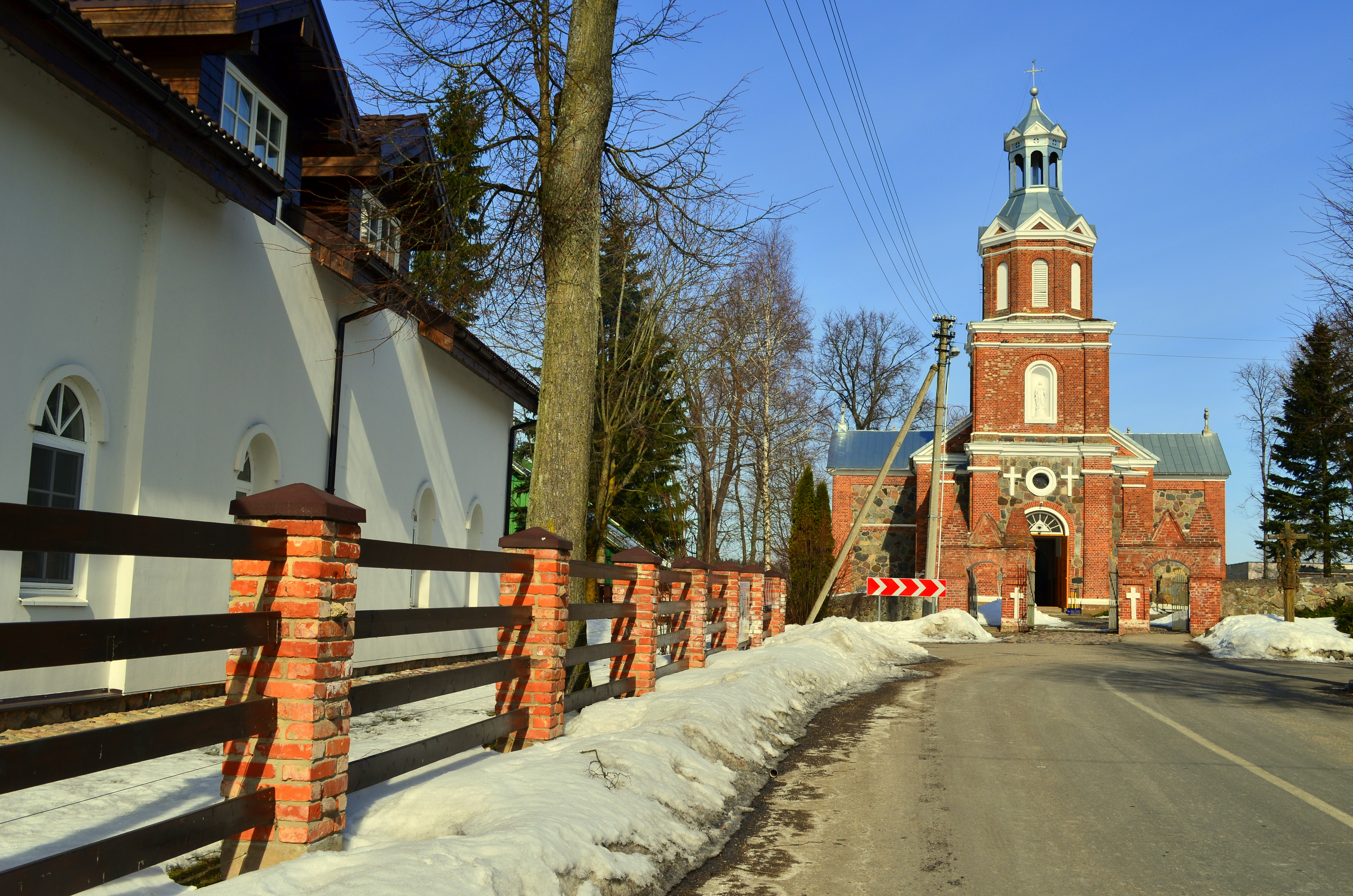 Vištyčio bažnyčia